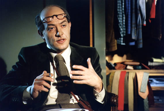 Foto di Fausto Bertinotti, imitato da Corrado Guzzanti